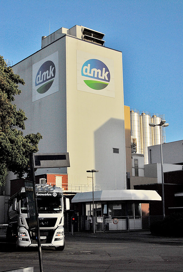 Zeven Aspe dmk